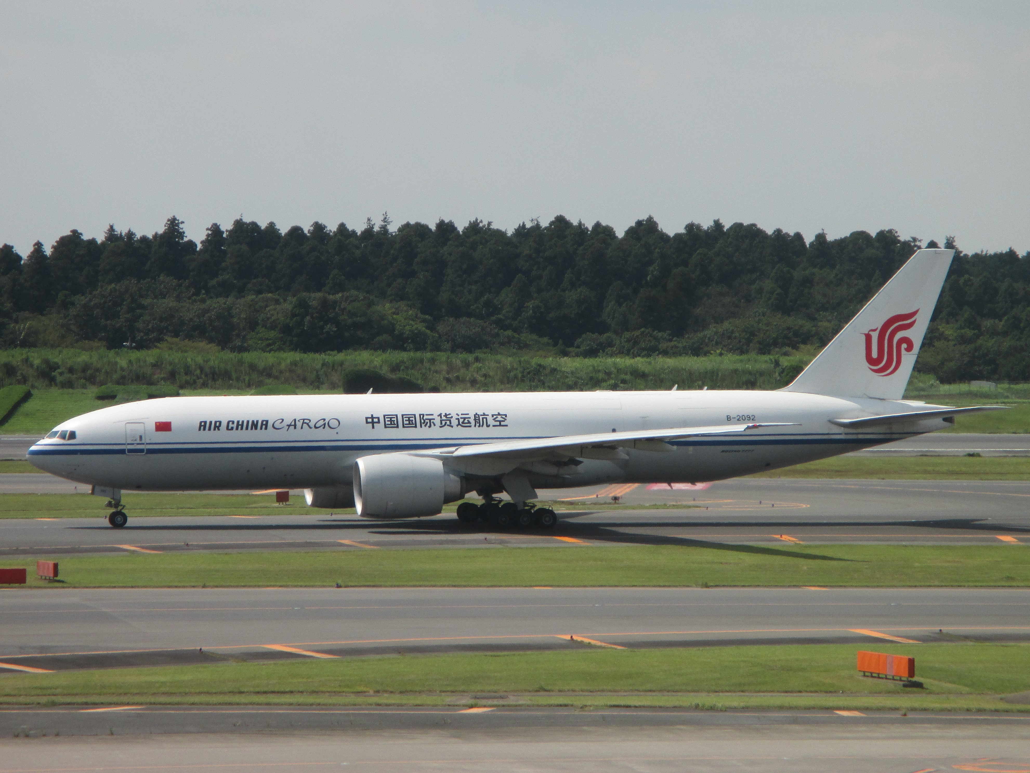 成田国際空港で撮影